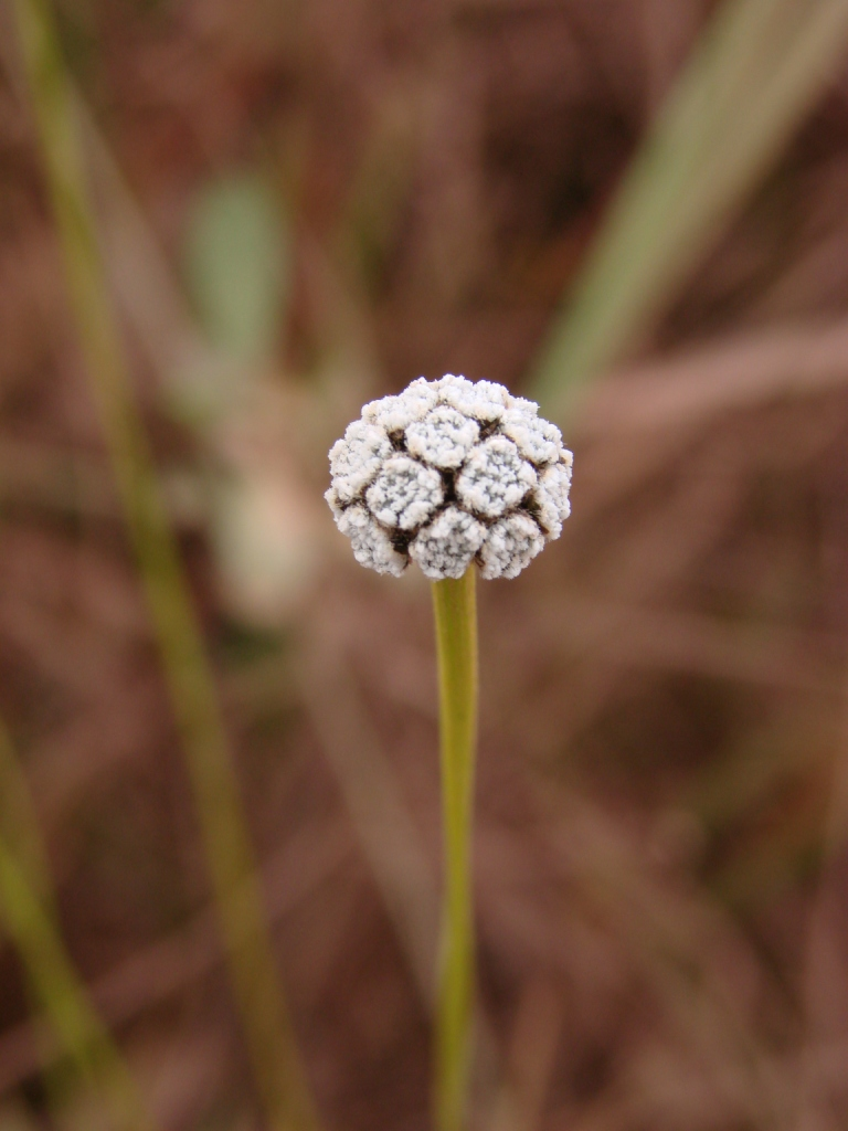 Paepalanthus globulifer - ERIOCAULACEAE - Parque Estadual do Biribiri - Serra do Espinhaço - Diamantina - Minas Gerais - Brasil.